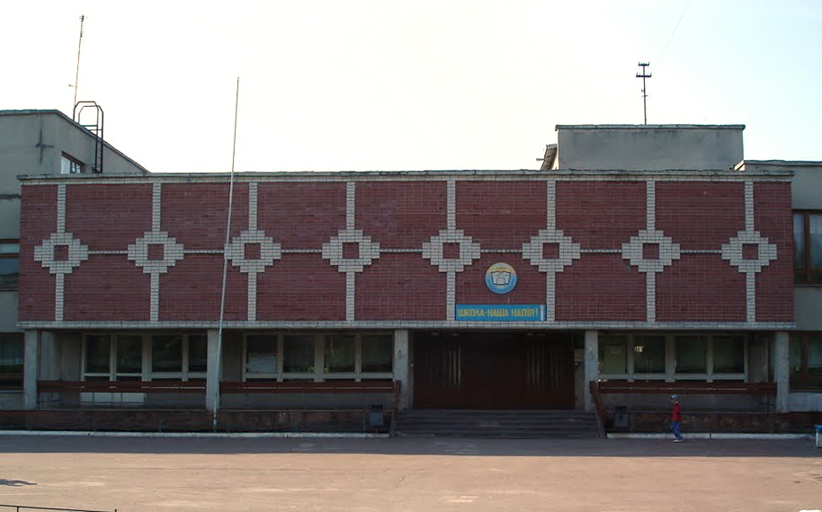 ЗСШФМП, 12 м.Чернігів